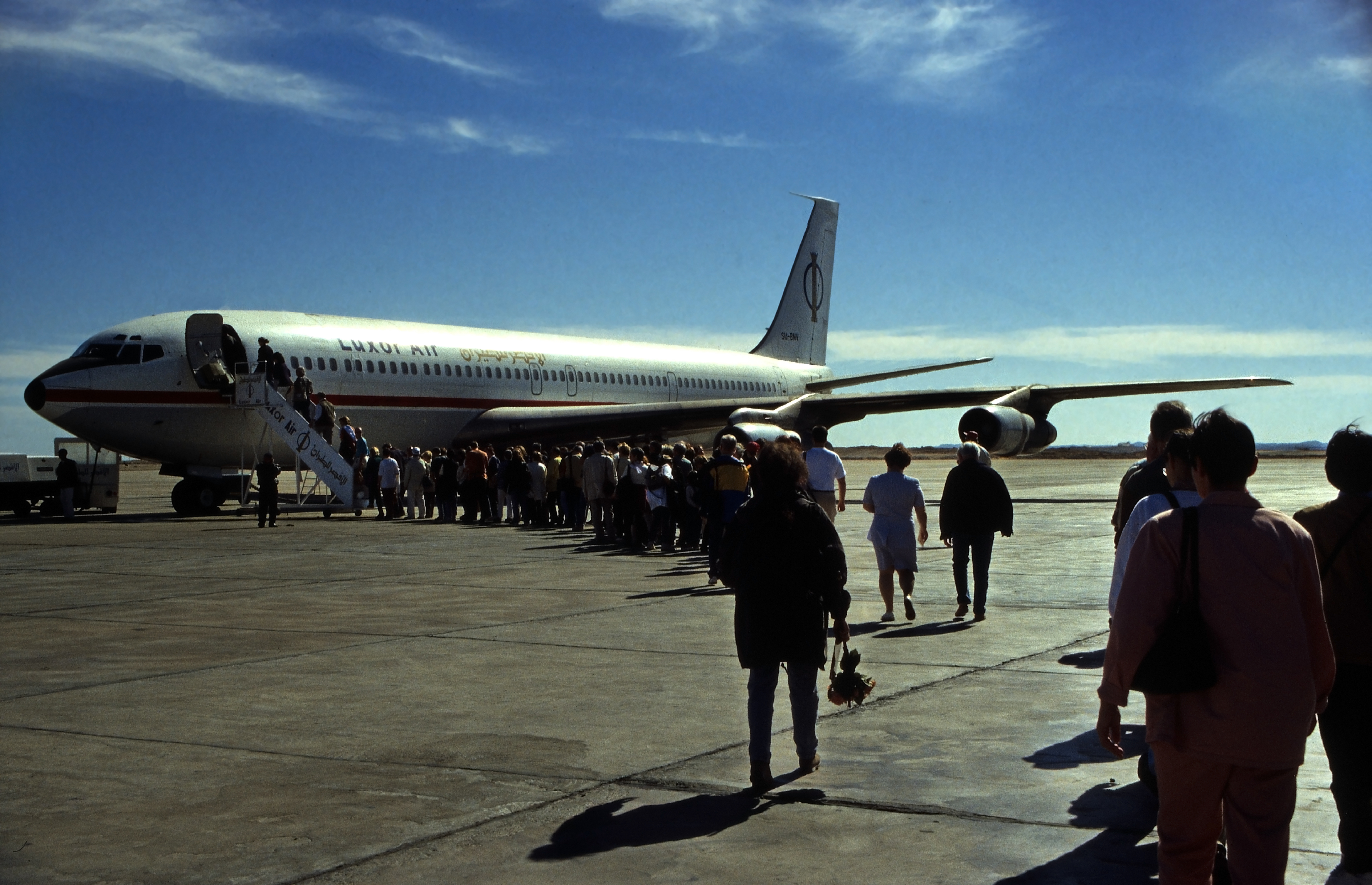 Auf dem Flugplatz zu den Rückflug von Abu Simbel nach Assuan